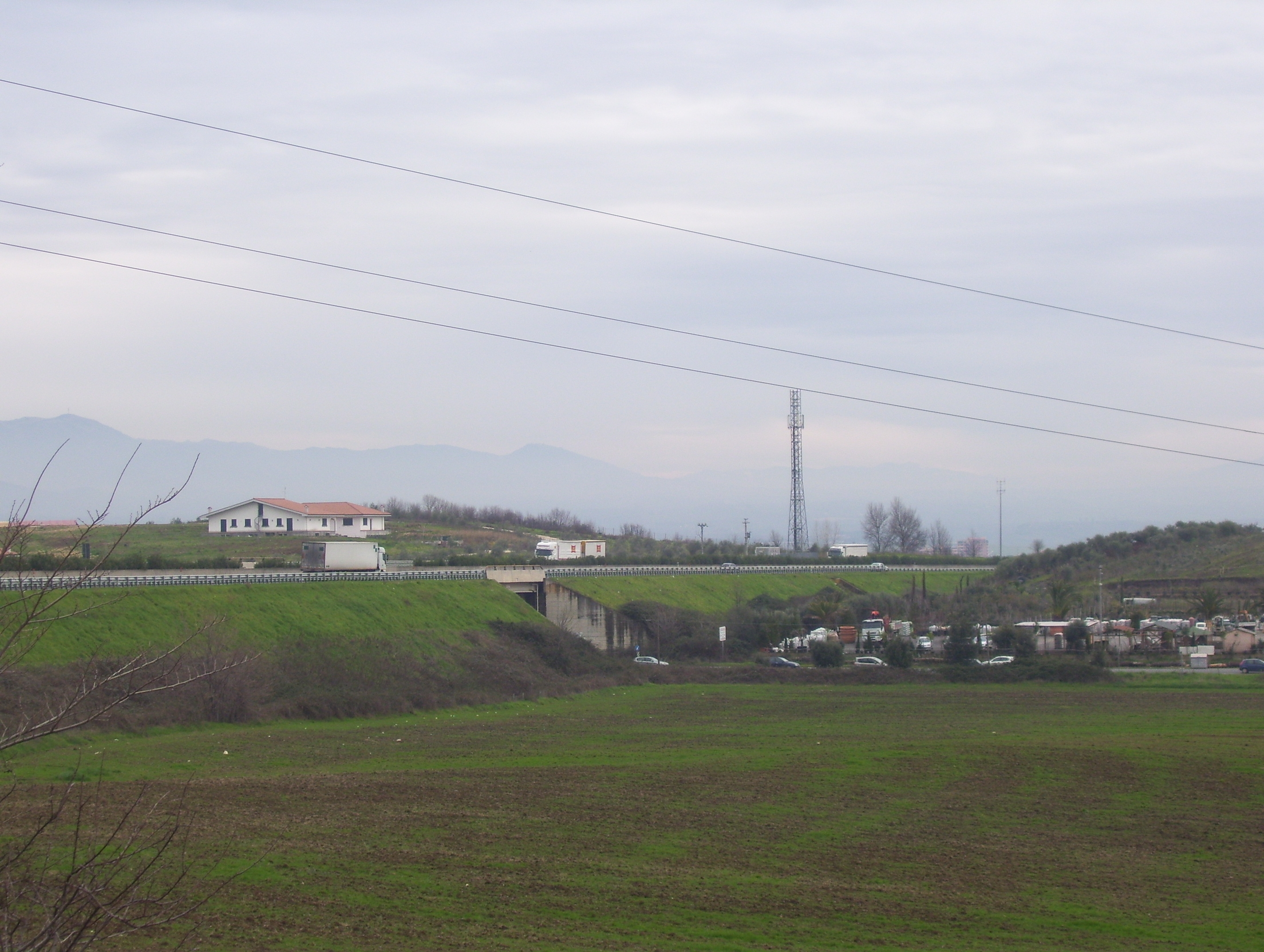 Autostrada A1 a Guidonia. Nella foto il tratto con cavalcavia sopra via di Casal Bianco.